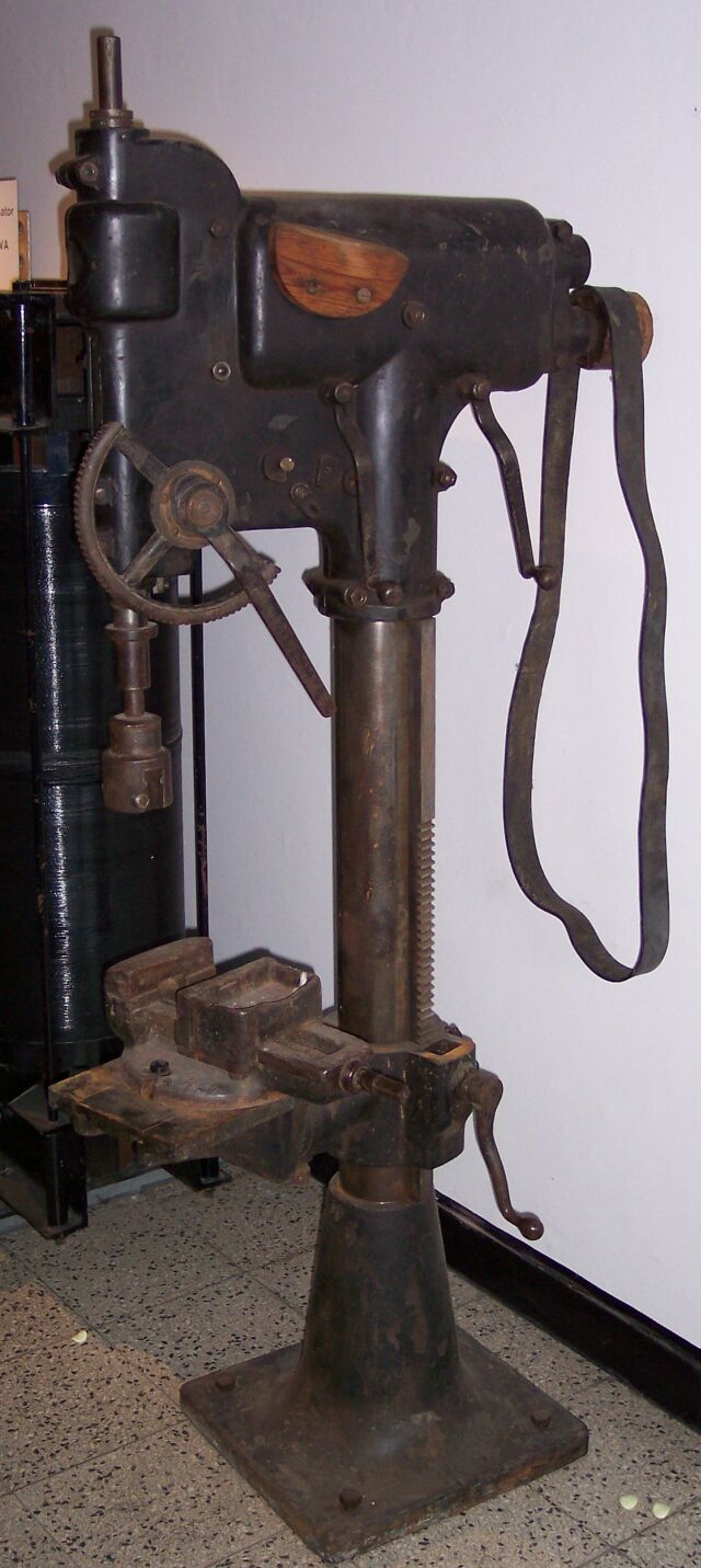 Ständerbohrmaschine mit Transmissionsantrieb, eigenes Bild GFDL